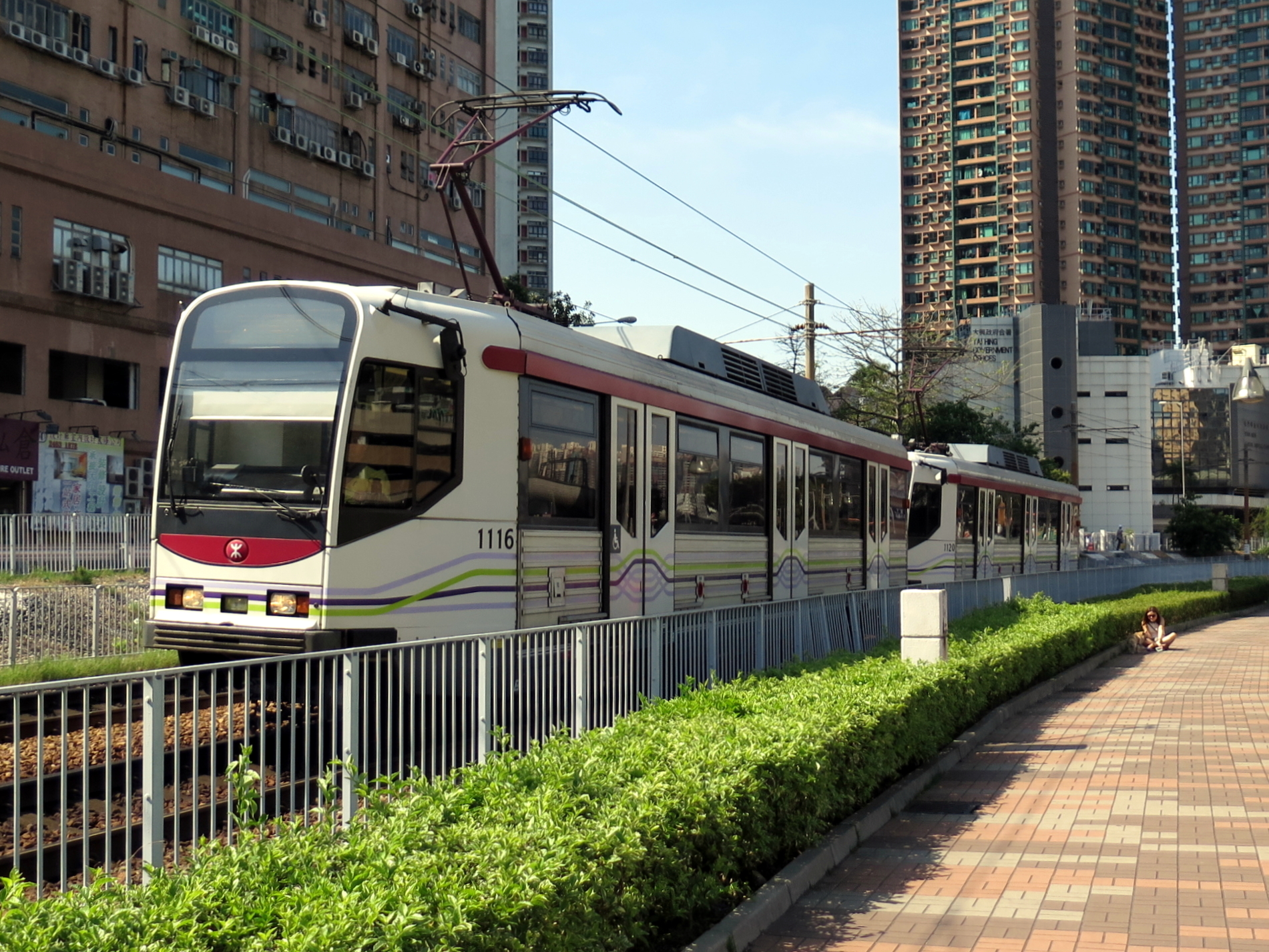 LRT Goninan 1116 & 1120